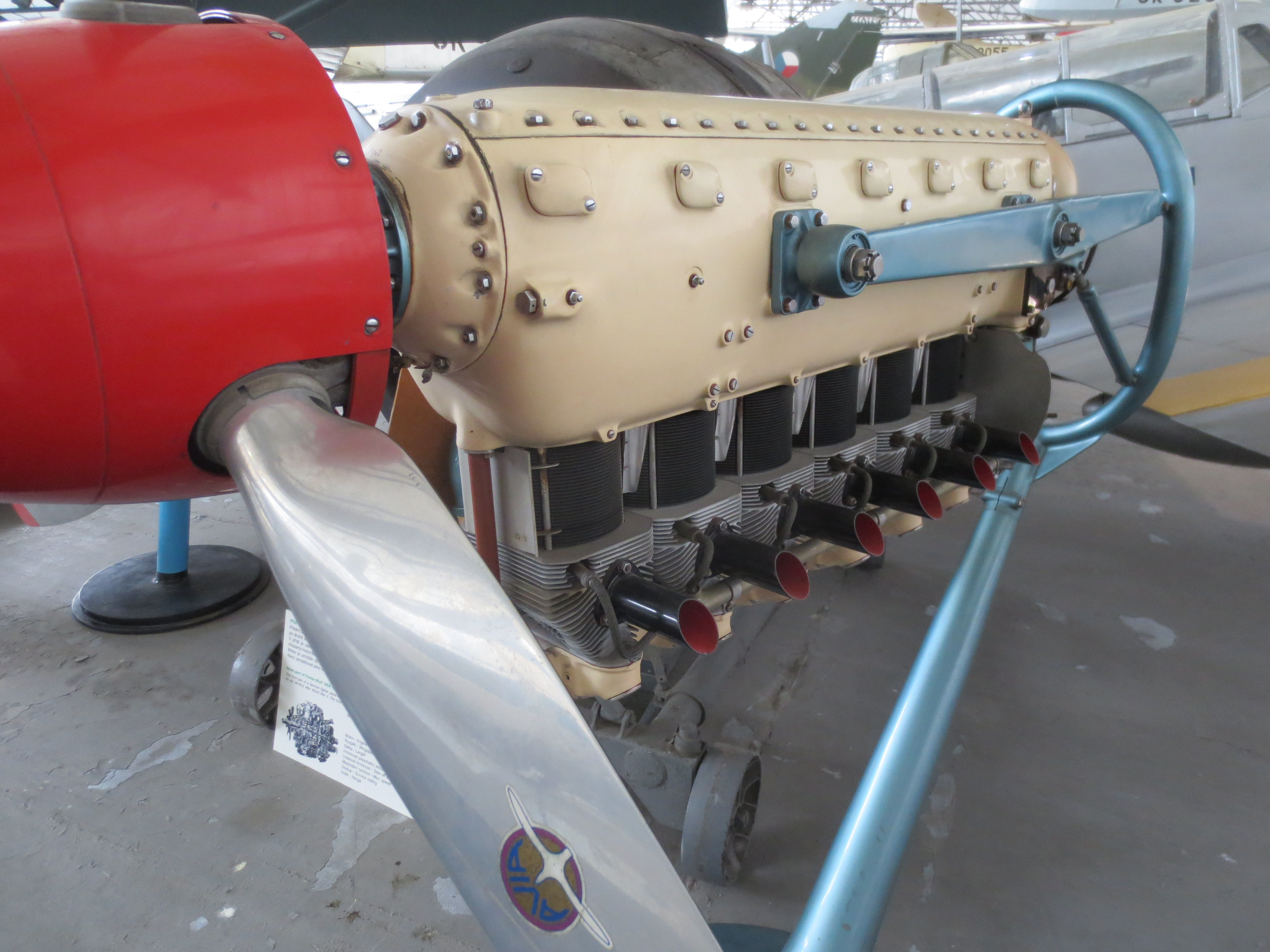 Walter M-337 (LM Kbely)